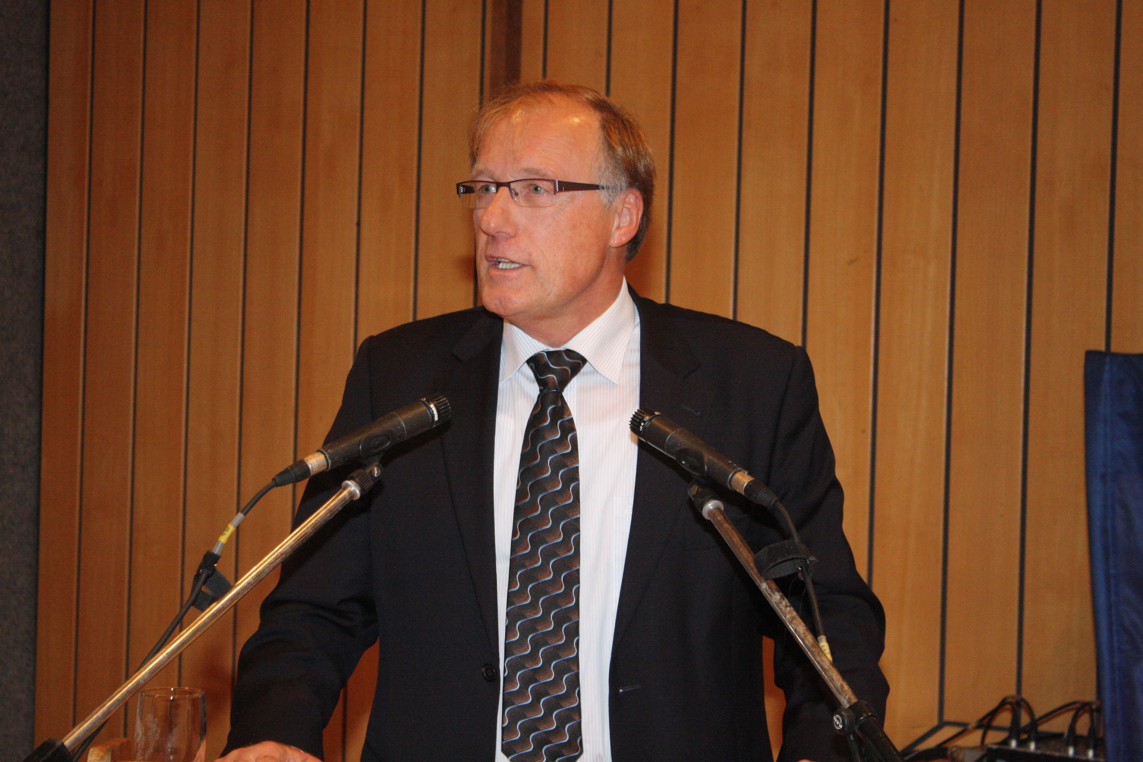 Herbert Huber (BLV-Vorsitzender) auf einer BLV-Podiumsdiskussion zur Zukunft der Beruflichen Bildung in Tauberbischofsheim 2012 Berufsschullehrerverband Baden-Württemberg